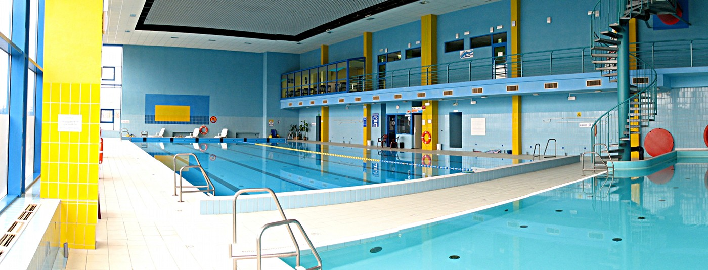 Gliwice. Ulica Mewy. Kryta pływalnia Mewa.